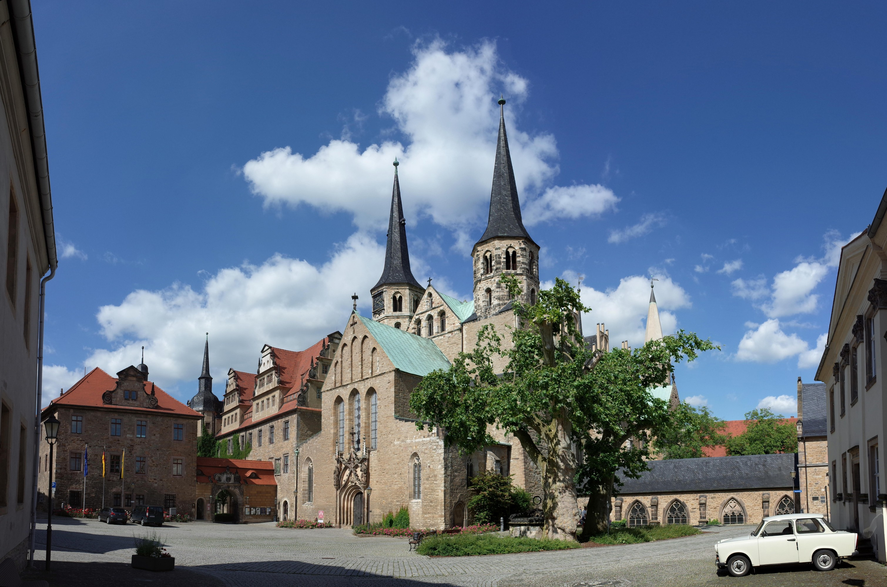 Naturdenkmal Platanen am Merseburger Dom